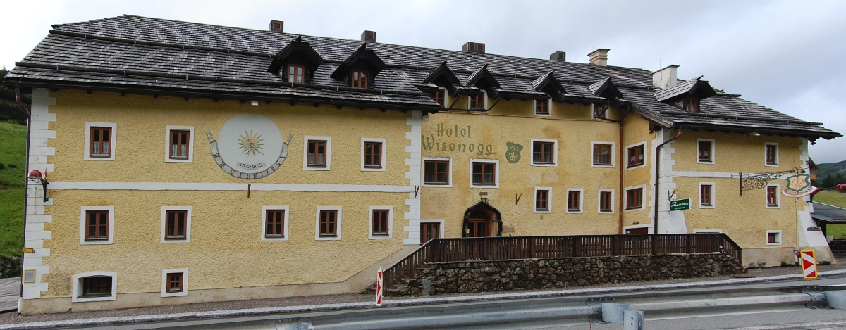 Tauernhaus Wisenegg, Obertauern KG Untertauern